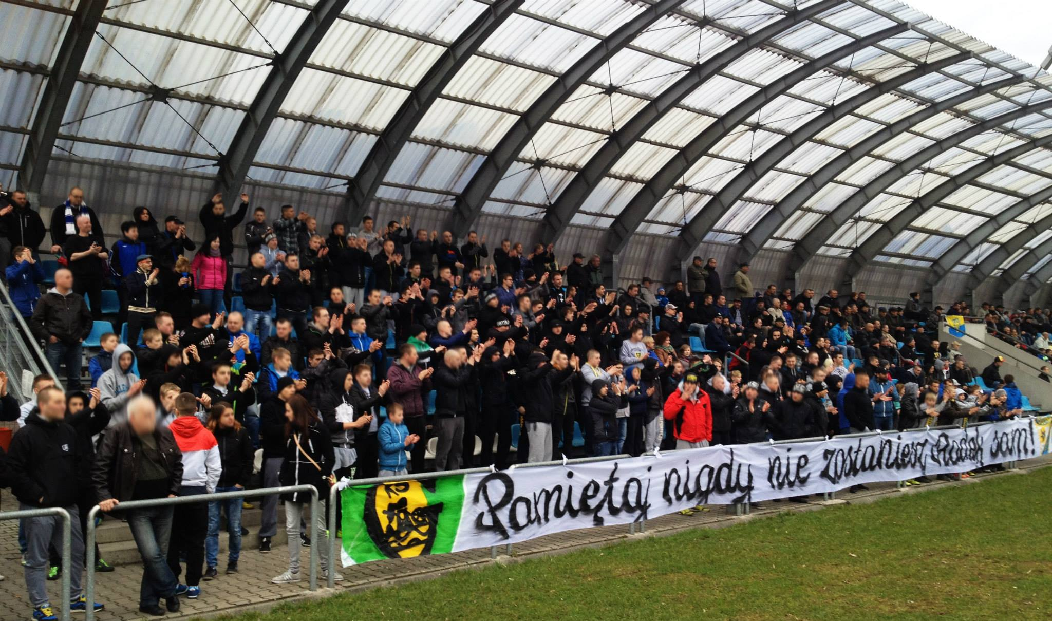 Zespół Górnika 09 zawsze może liczyć na głośne wsparcie swoich kibiców!